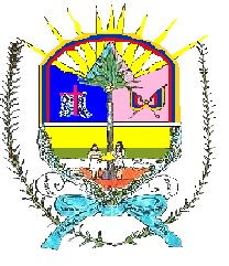 Escudo del municipio Mariño. Estado Sucre. Venezuela